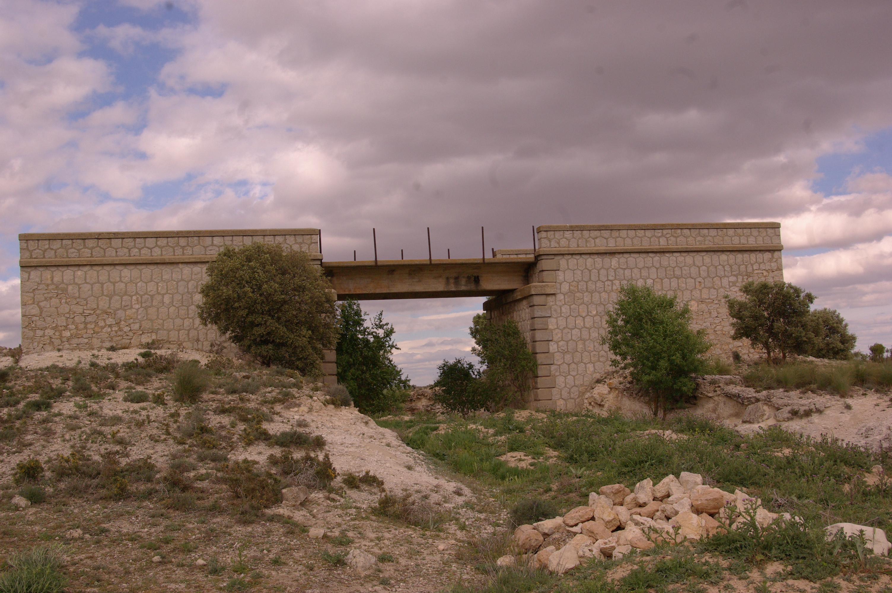 puente sobre el ferrocarril de utiel a baeza